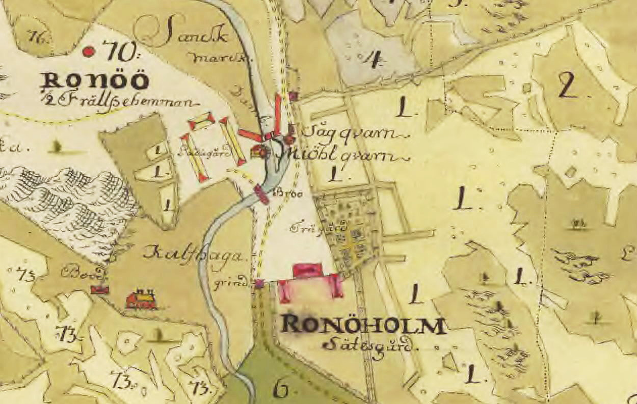 Del av karta över Ronöholms ägor visande huvudbebyggelsen